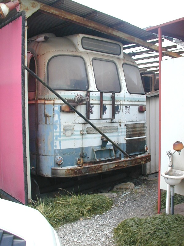 全但バス